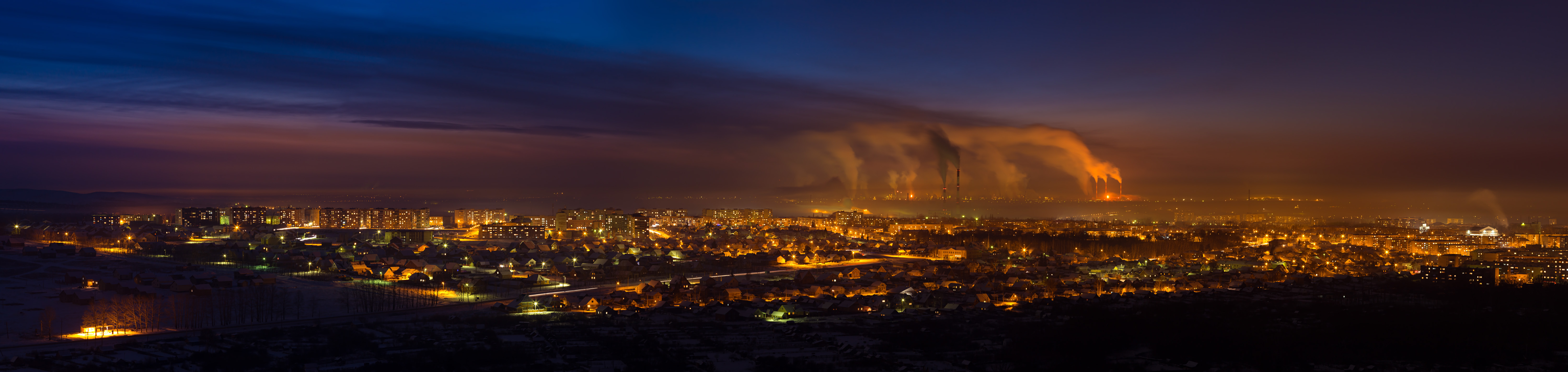 Панорама ночного Ишимбая.